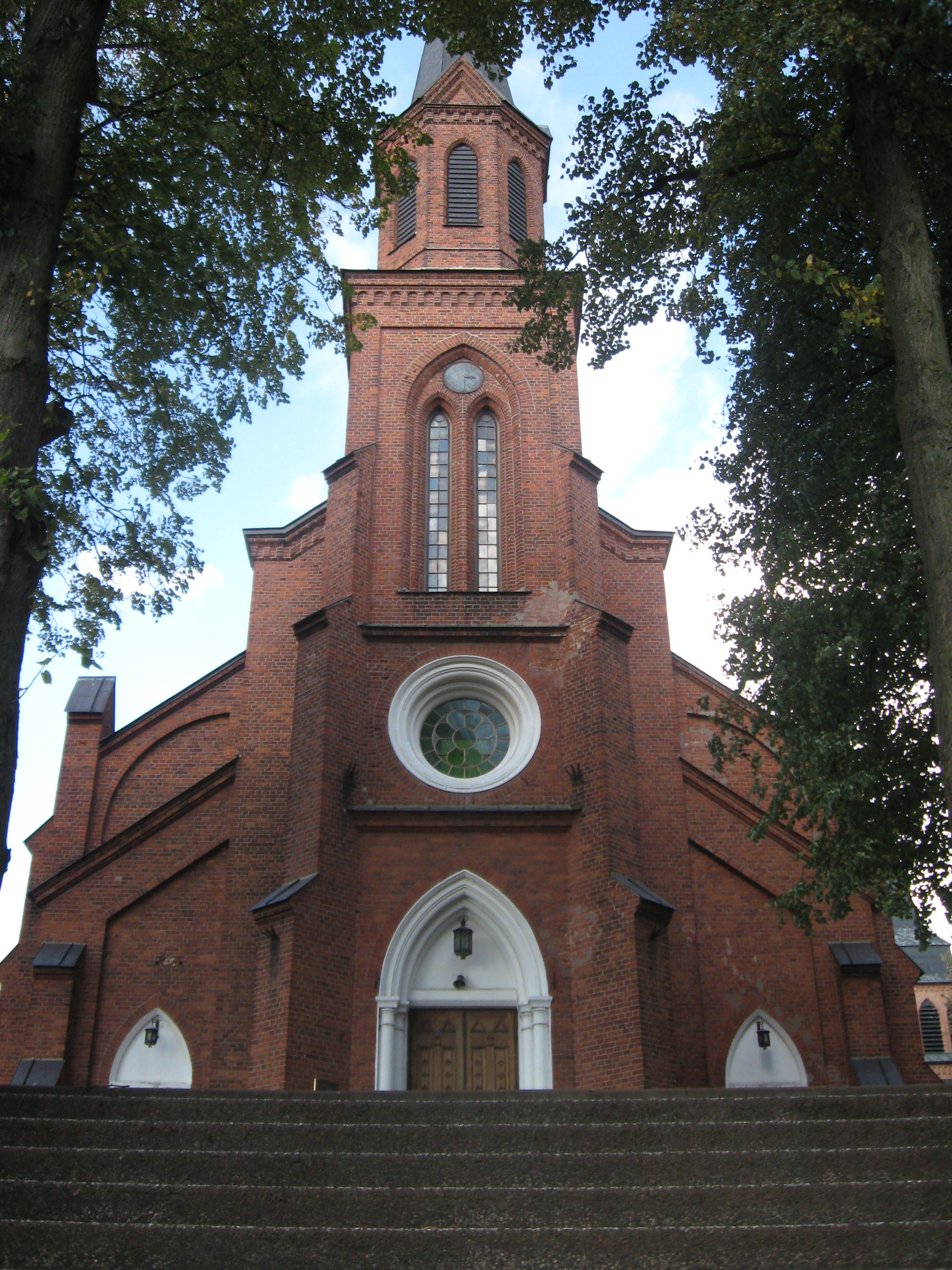 Miedzna - rzymskokatolicki kościół parafialny pw. Zwiastowania NMP, 1887-1893